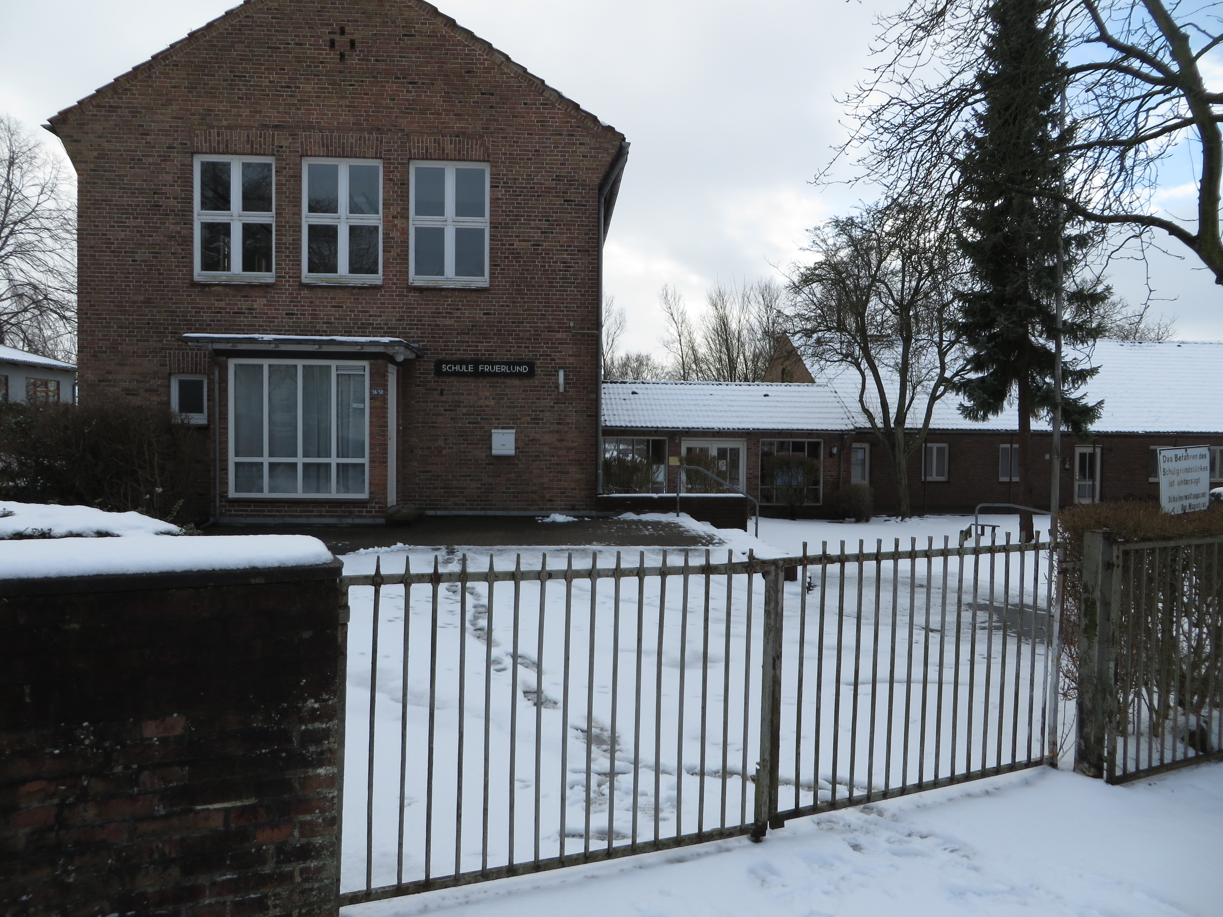 Fruerlund-Schule (Flensburg Januar 2015), Bild 08